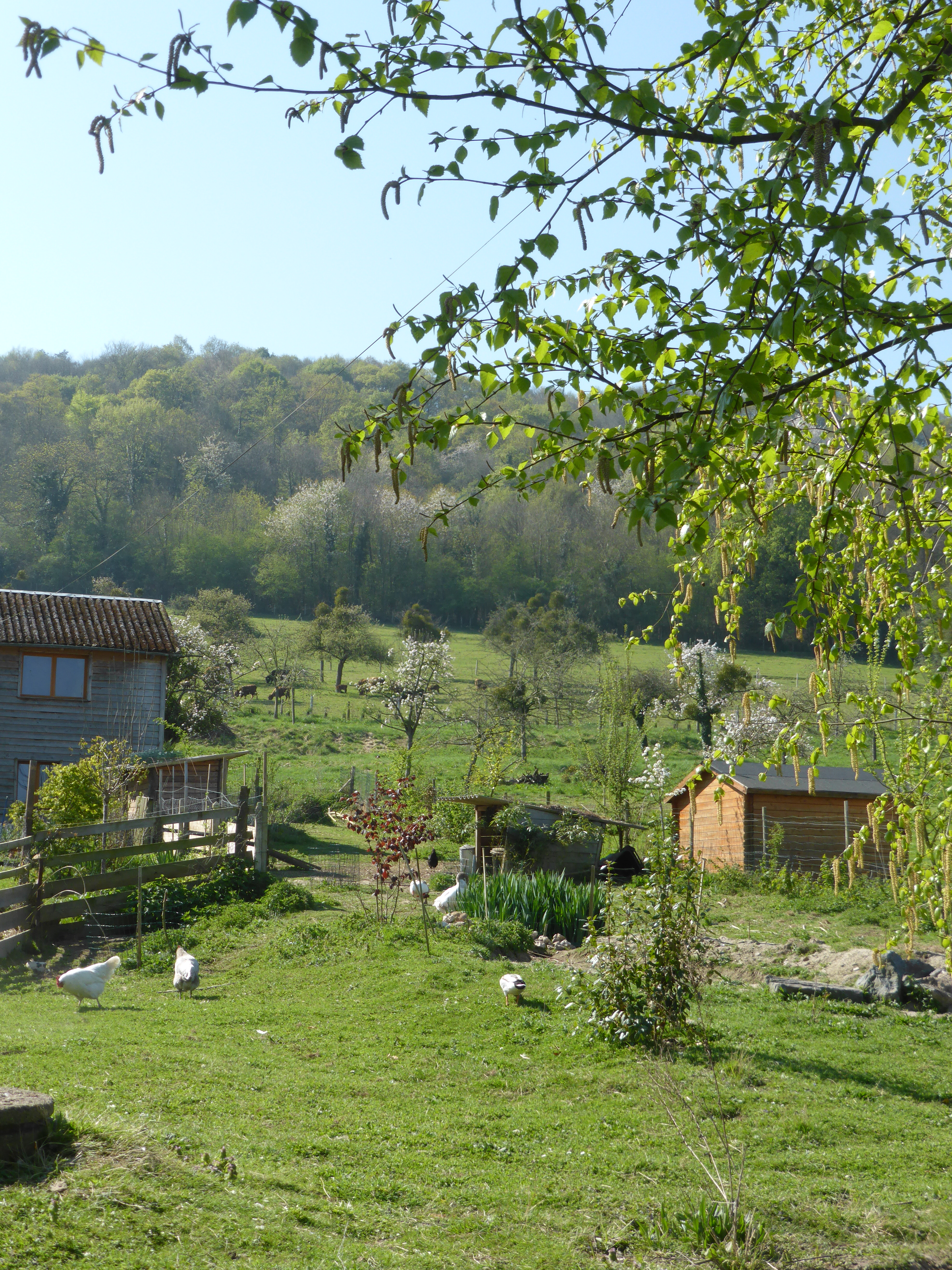 Route des chaumières dans le Marais Vernier (Seine Maritime)